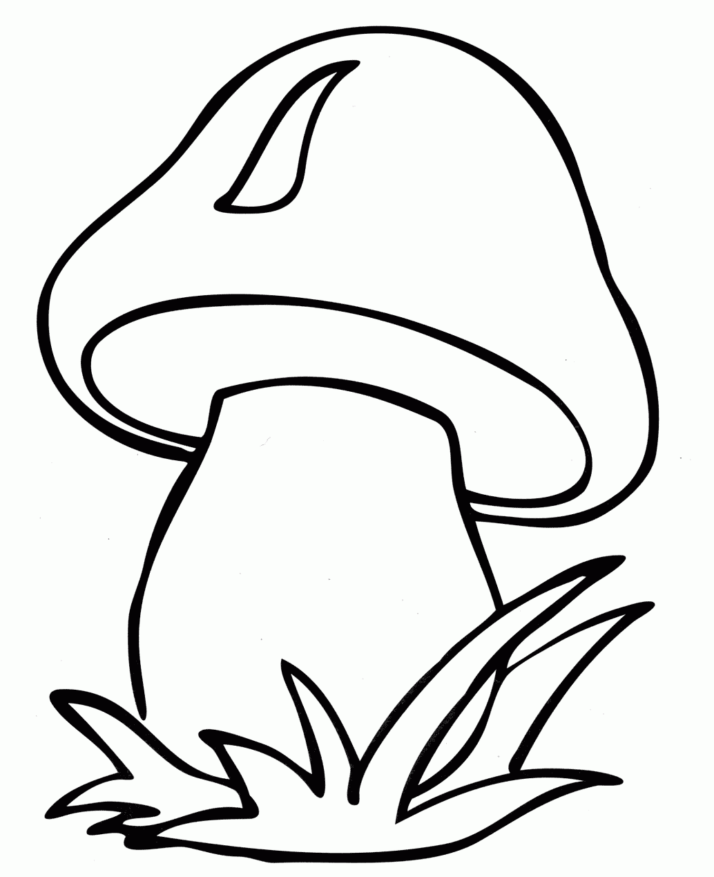 Рисунок для раскрашивания